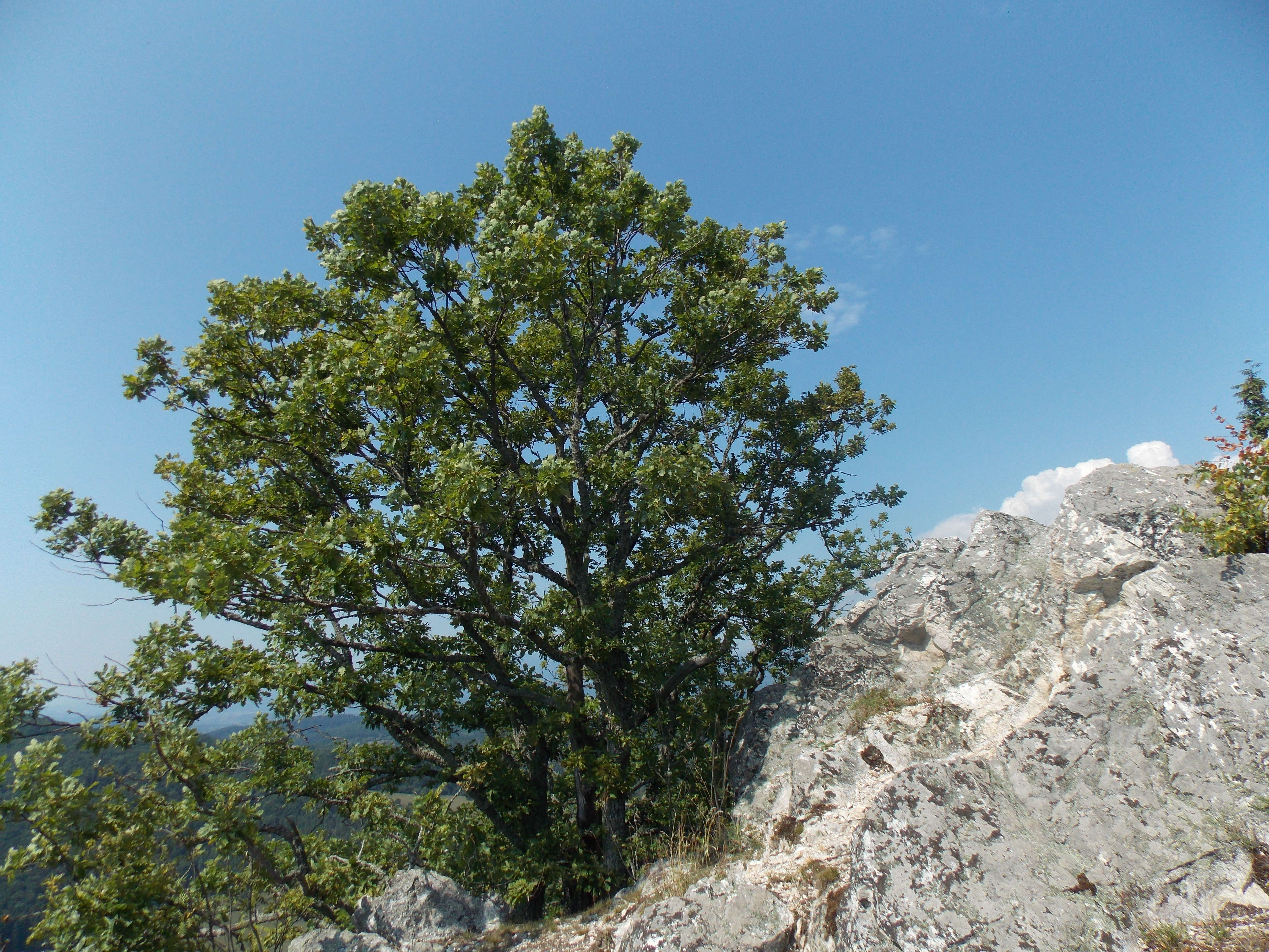 Porasty duba zimného (Quercus petraea) na prírodnej rezervácii Breznianska skalka